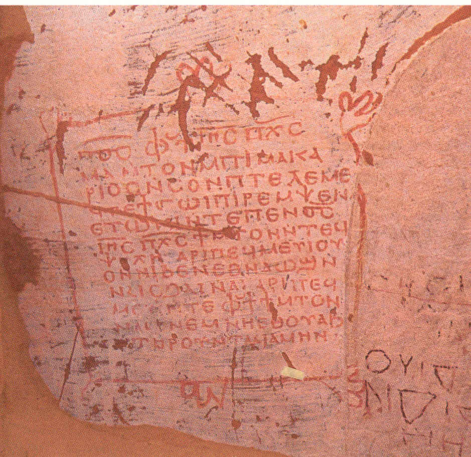 ecritures coptes. Une inscription en langue copte sur le site des Kellia (Egypte)